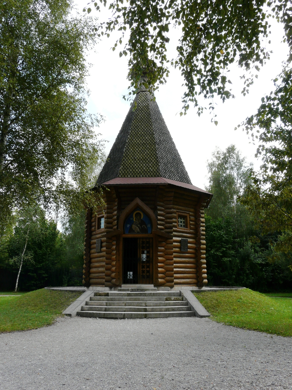 1995 gebaute Russisch-Orthodoxe Kapelle als Mahnmal im Konzentrationslager Dachau.